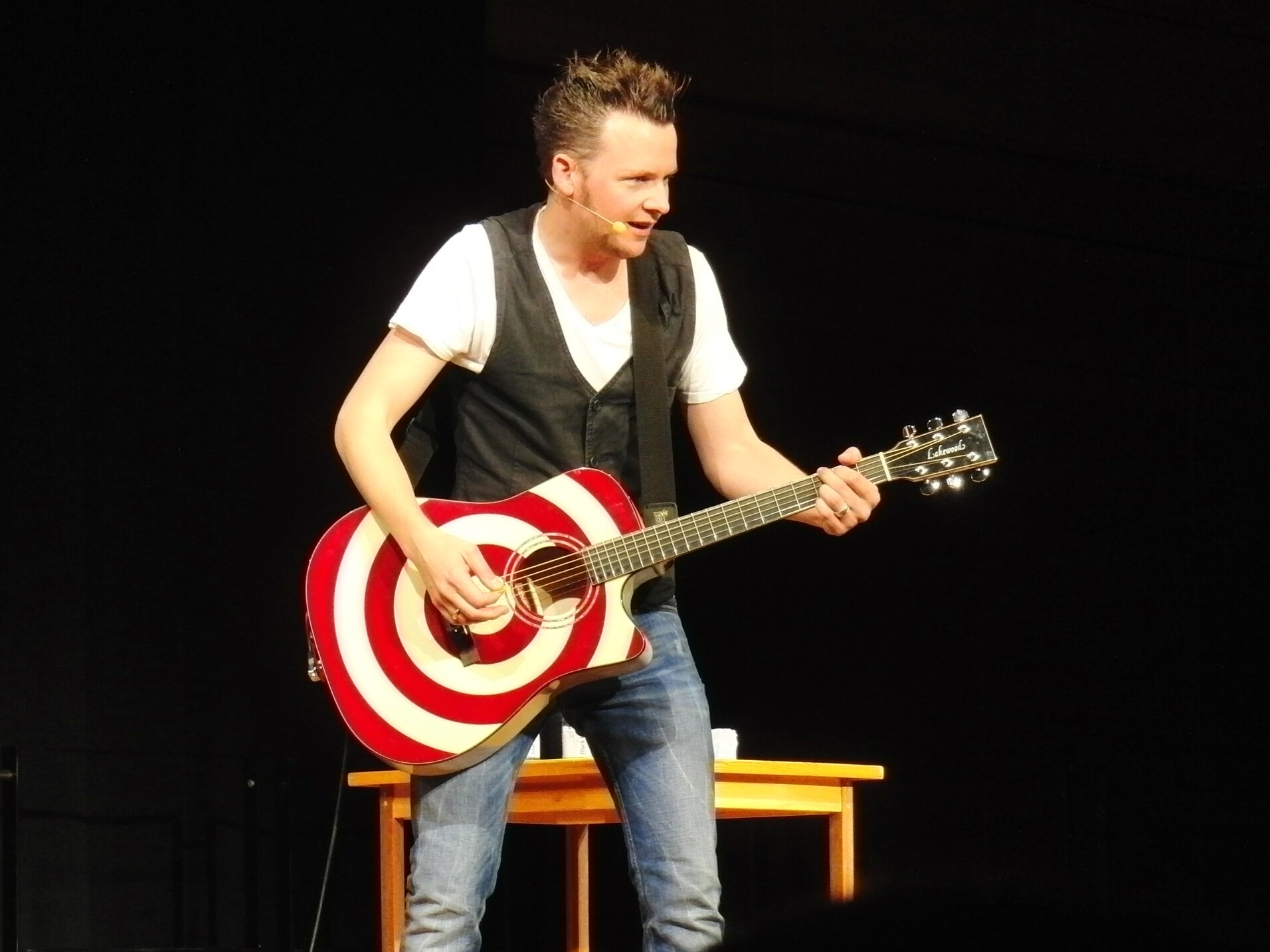 Tobias Mann bei seinem Auftritt am 8. Oktober 2011 im "Das Wormser" in Worms